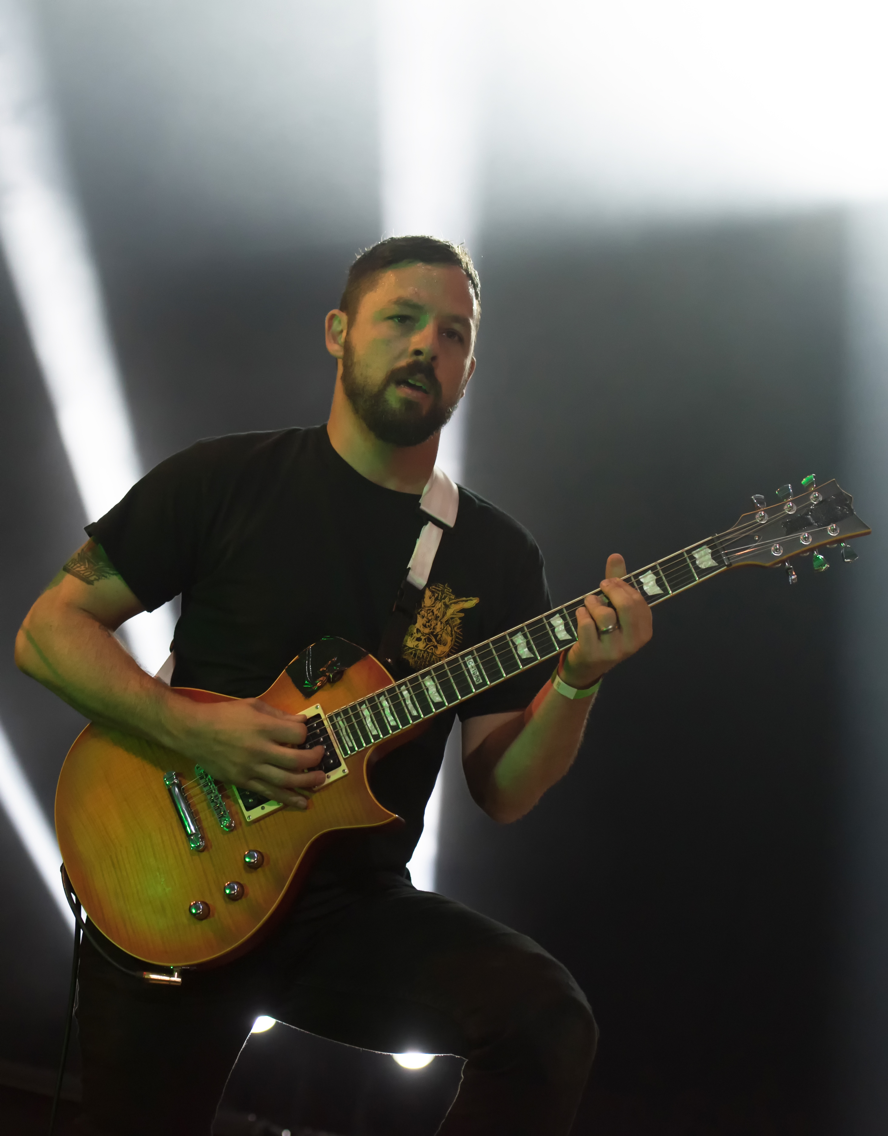 The Dillinger Escape Plan beim Wacken Open Air 2017